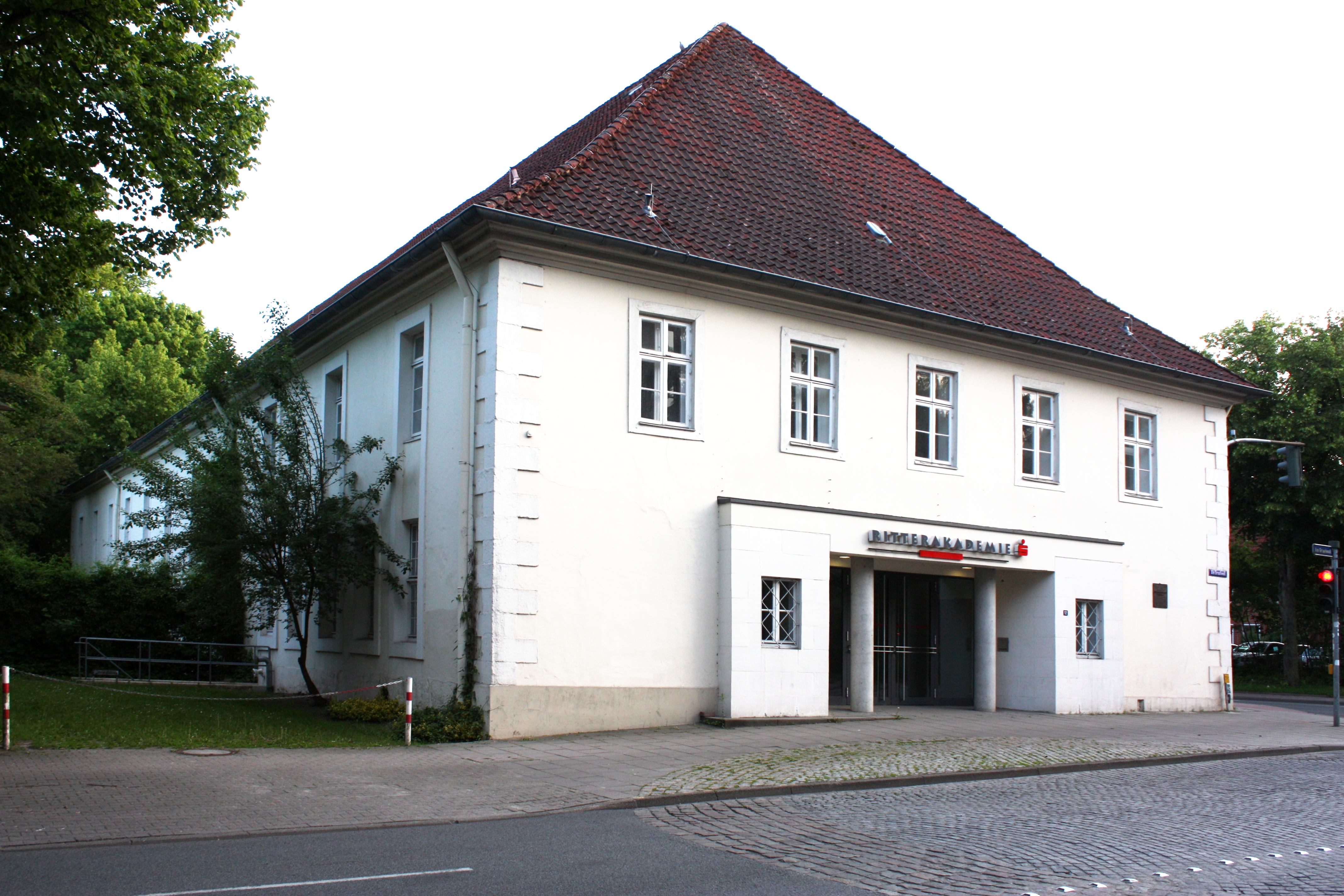 Kommunikationszentrum "Ritterakademie" der Sparkasse Lüneburg, Am Graalwall 12, Lüneburg, ehem. Reithalle der Ritterakademie, erbaut 1790